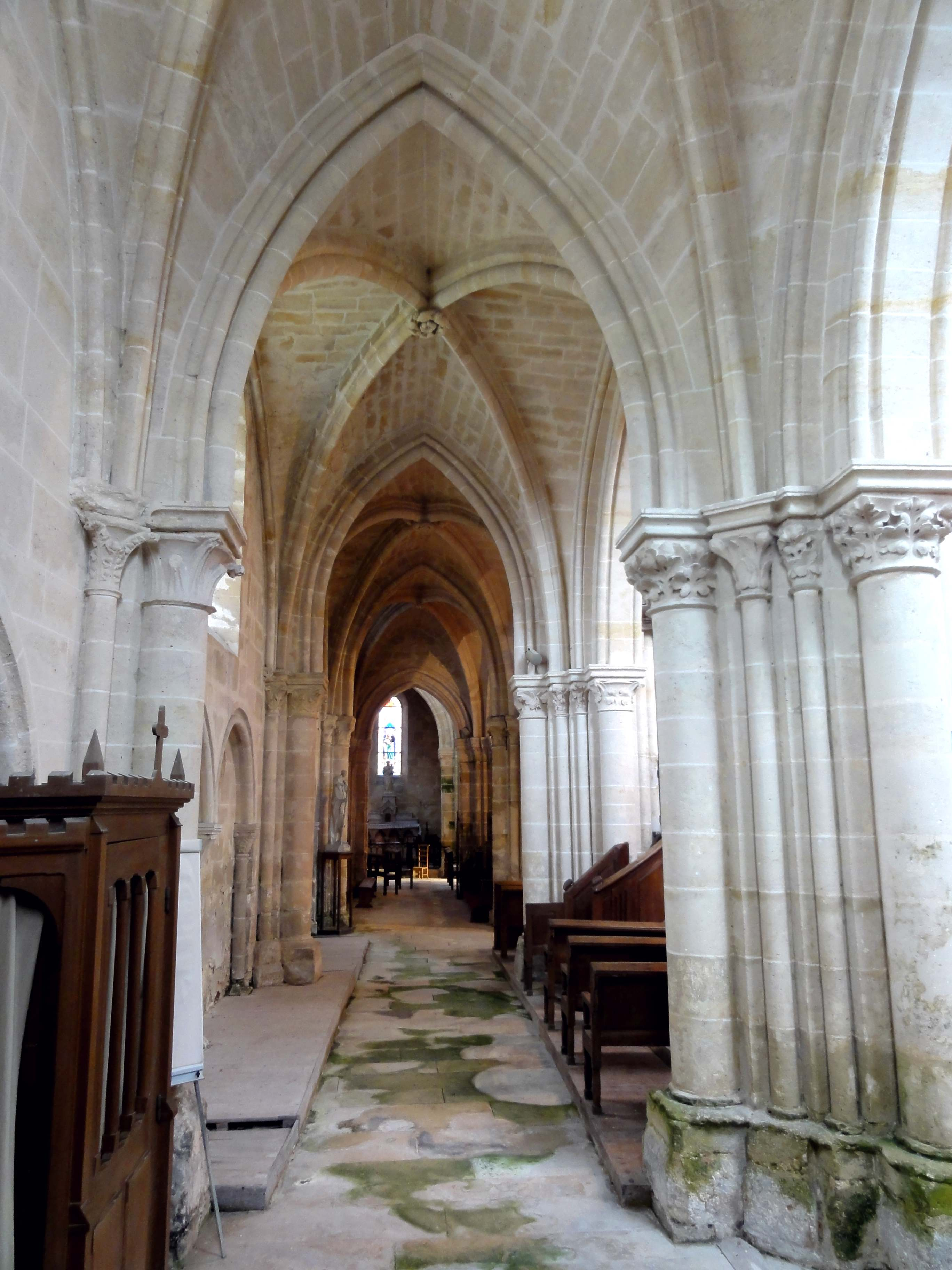 Intérieur de l'église - voir titre.